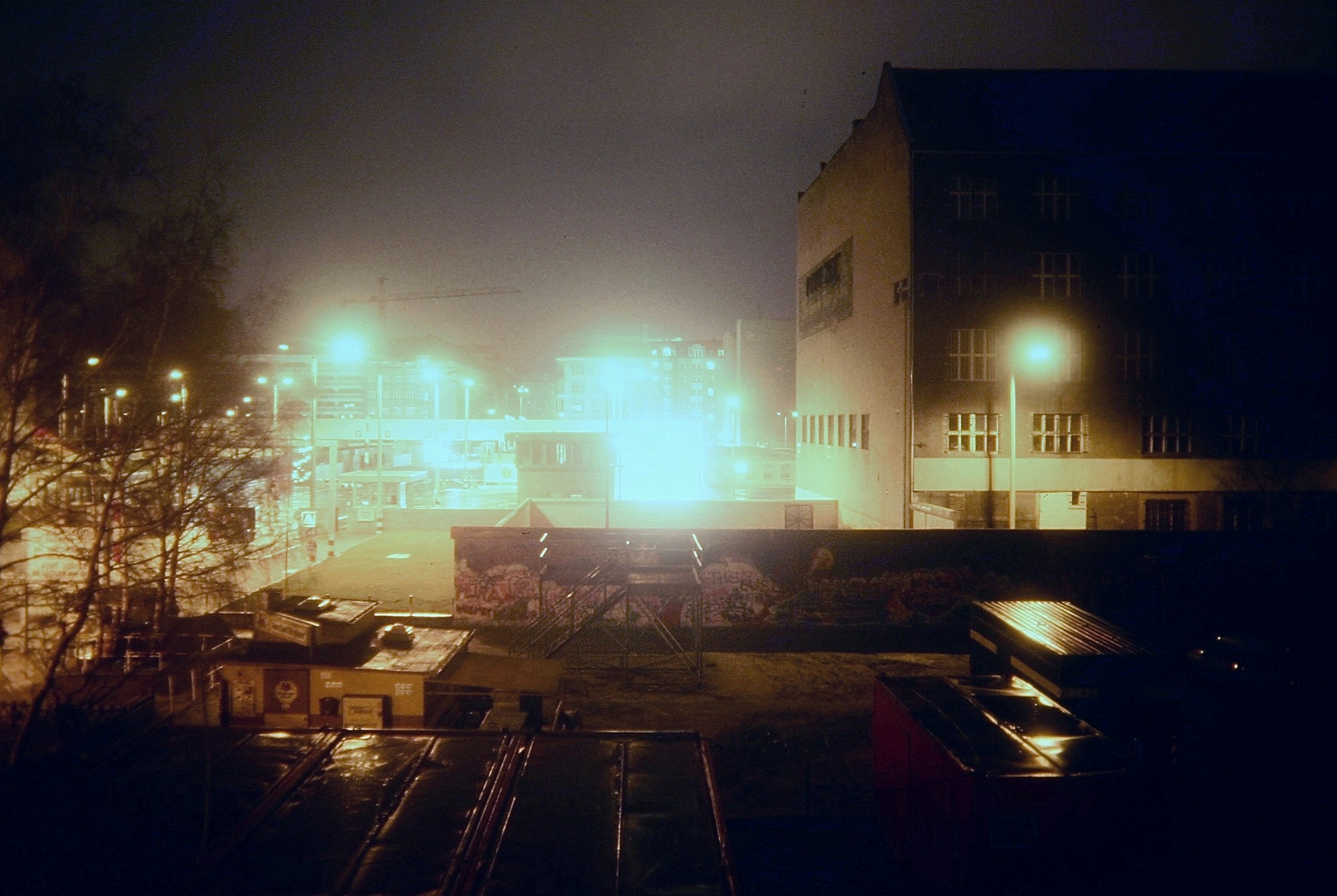 Checkpoint Charlie nachts vom "Museum am Checkpoint Charlie" aus gesehen, 1988